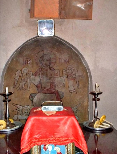 مذبح كنيسة الشهيد مار جرجس بدير الأنبا بيشوي، وادي النطرون.